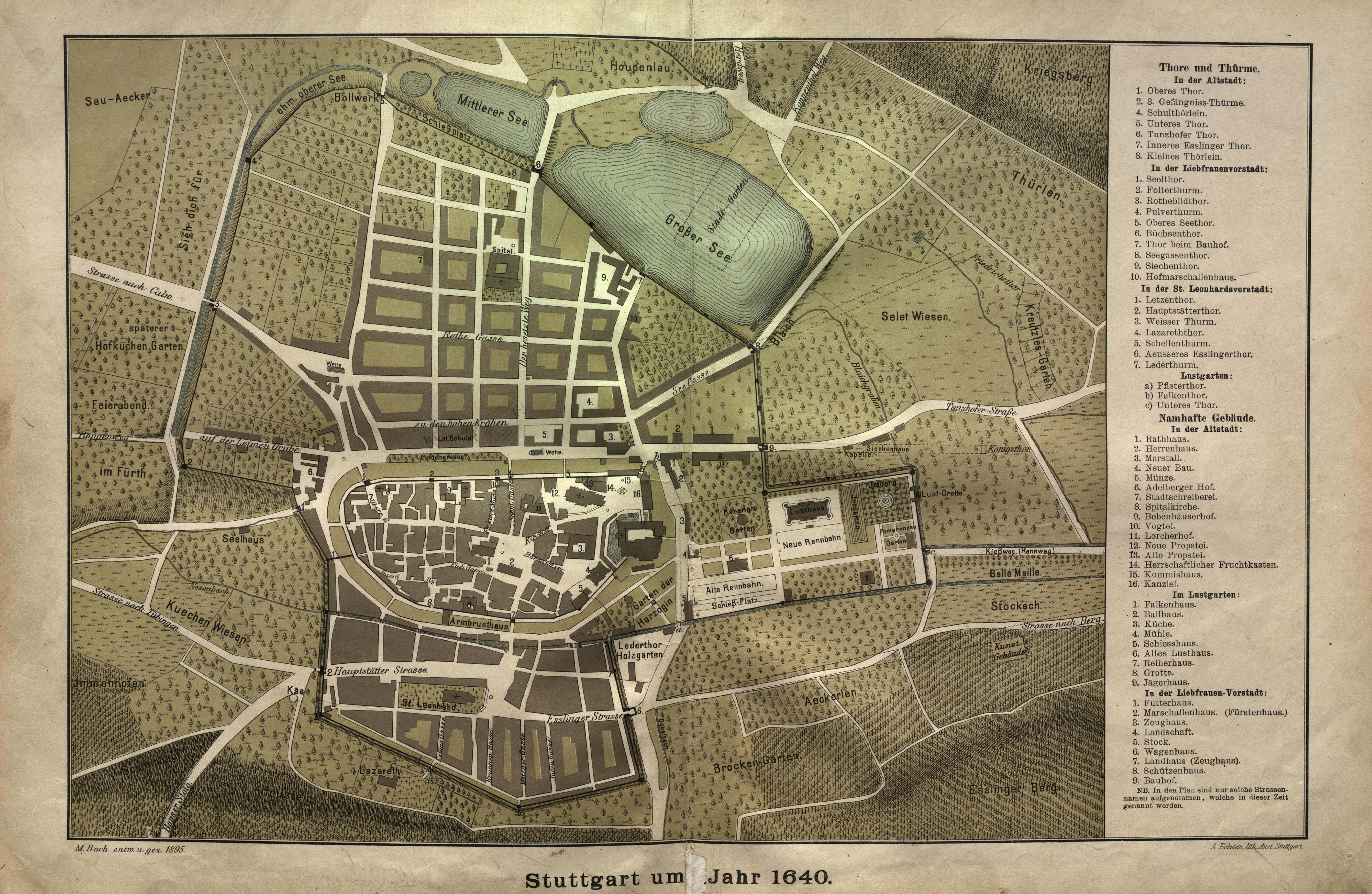 Stuttgart um Jahr 1640, Stadtplan.